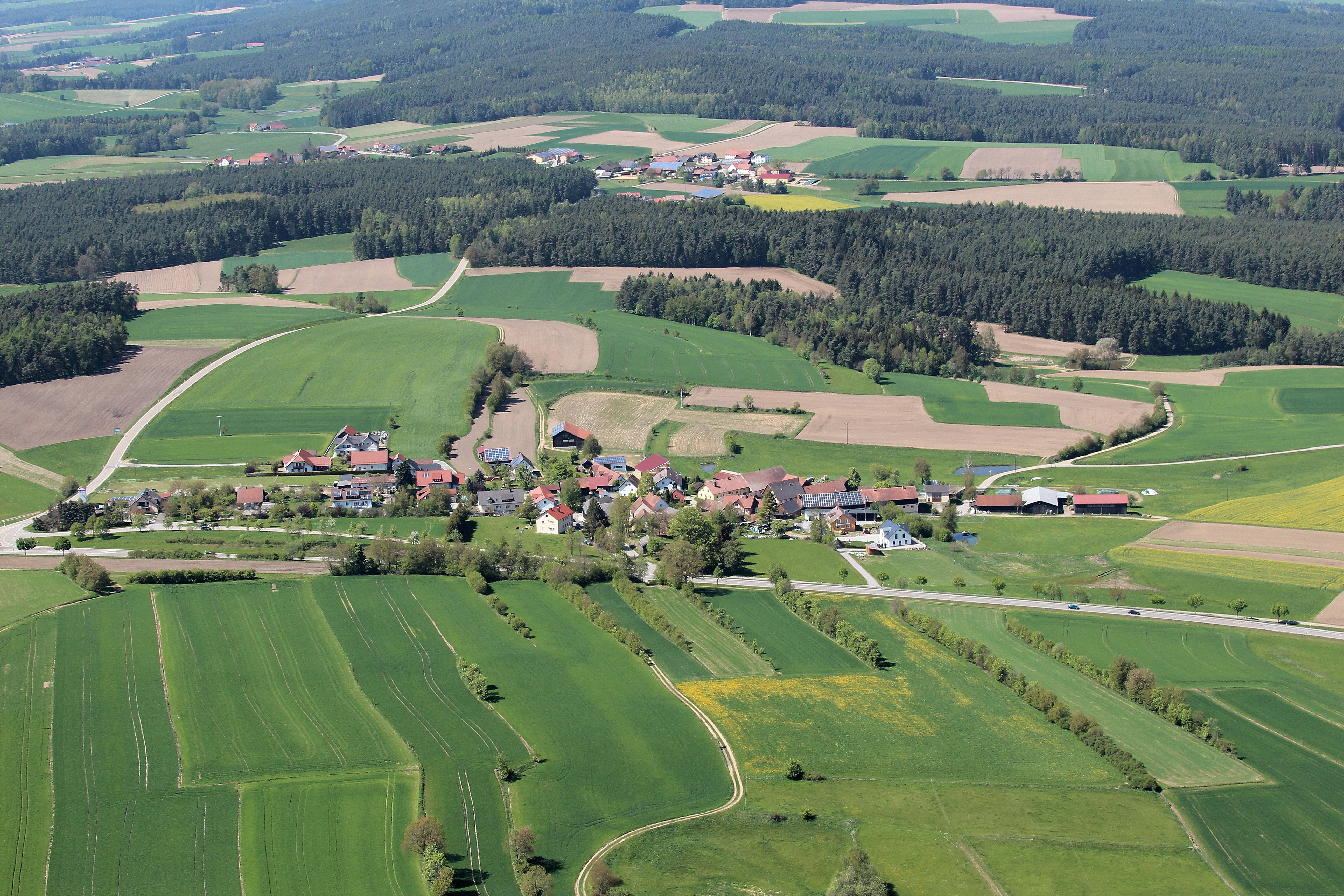 Lengfeld, Stadt Neunburg vorm Wald; Landkreis Schwandorf, Oberpfalz, Bayern